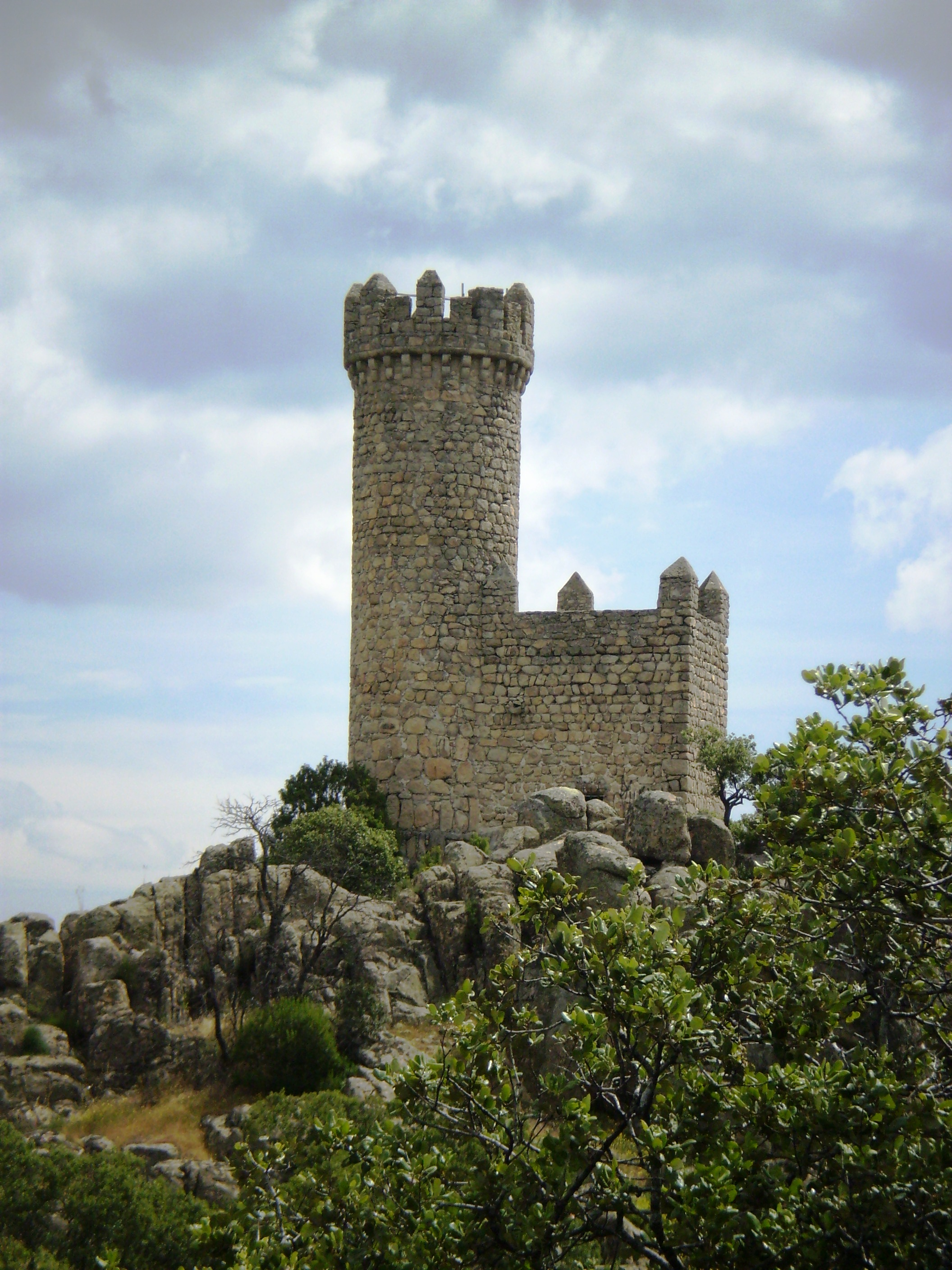 Torre vigía (o atalaya) de Torrelodones (Madrid, España)